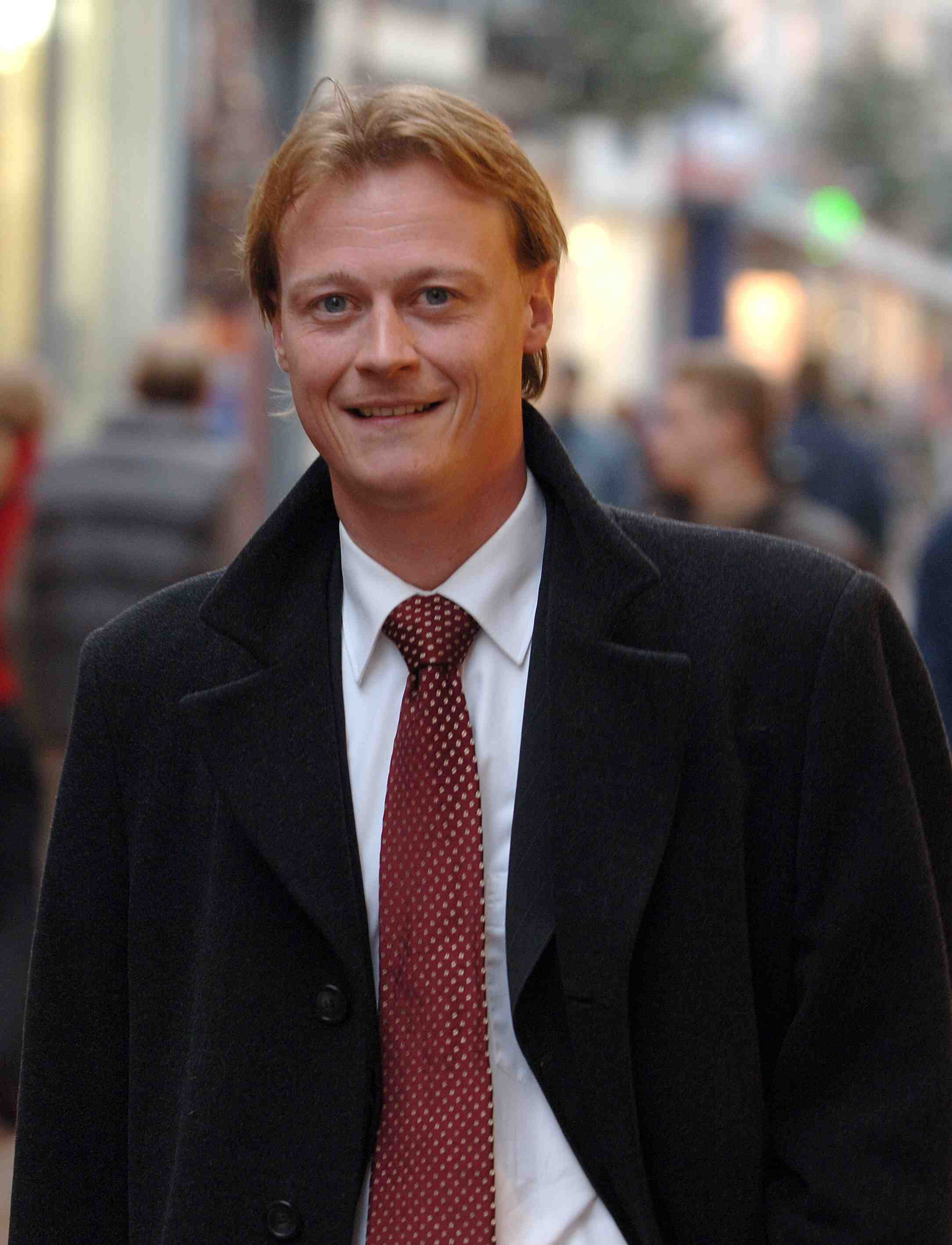 eigen werk